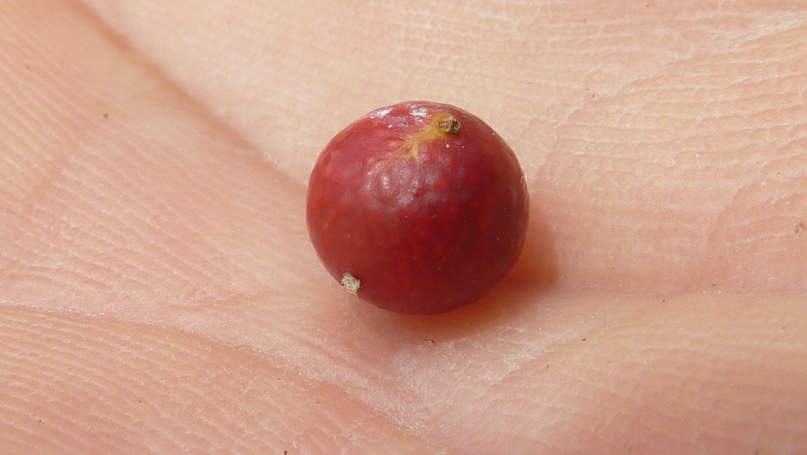 Myrciaria ferruginea O.Berg